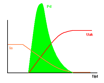 Zelf gemaakt